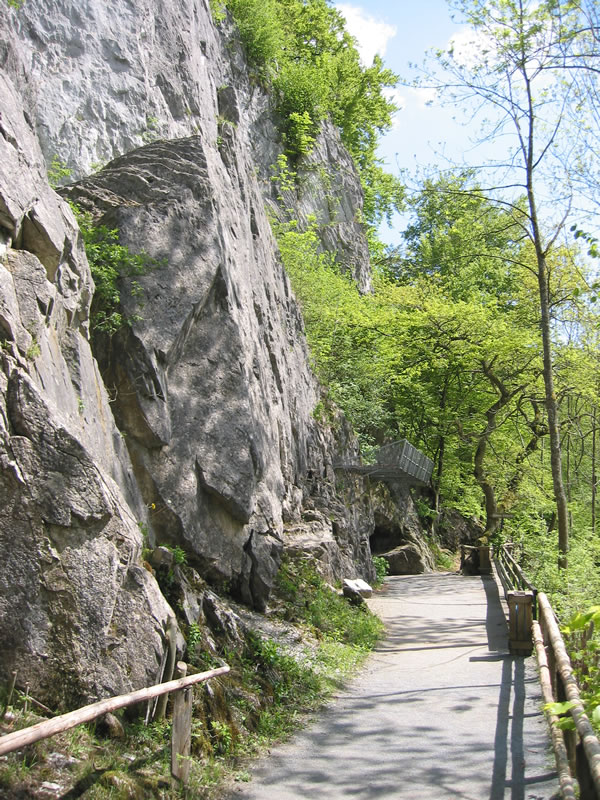 Eingangsbereich der Bilsteinhöhle, Warstein: Weg unterhalb des Bilsteinfelsens zum Höhleneingang.